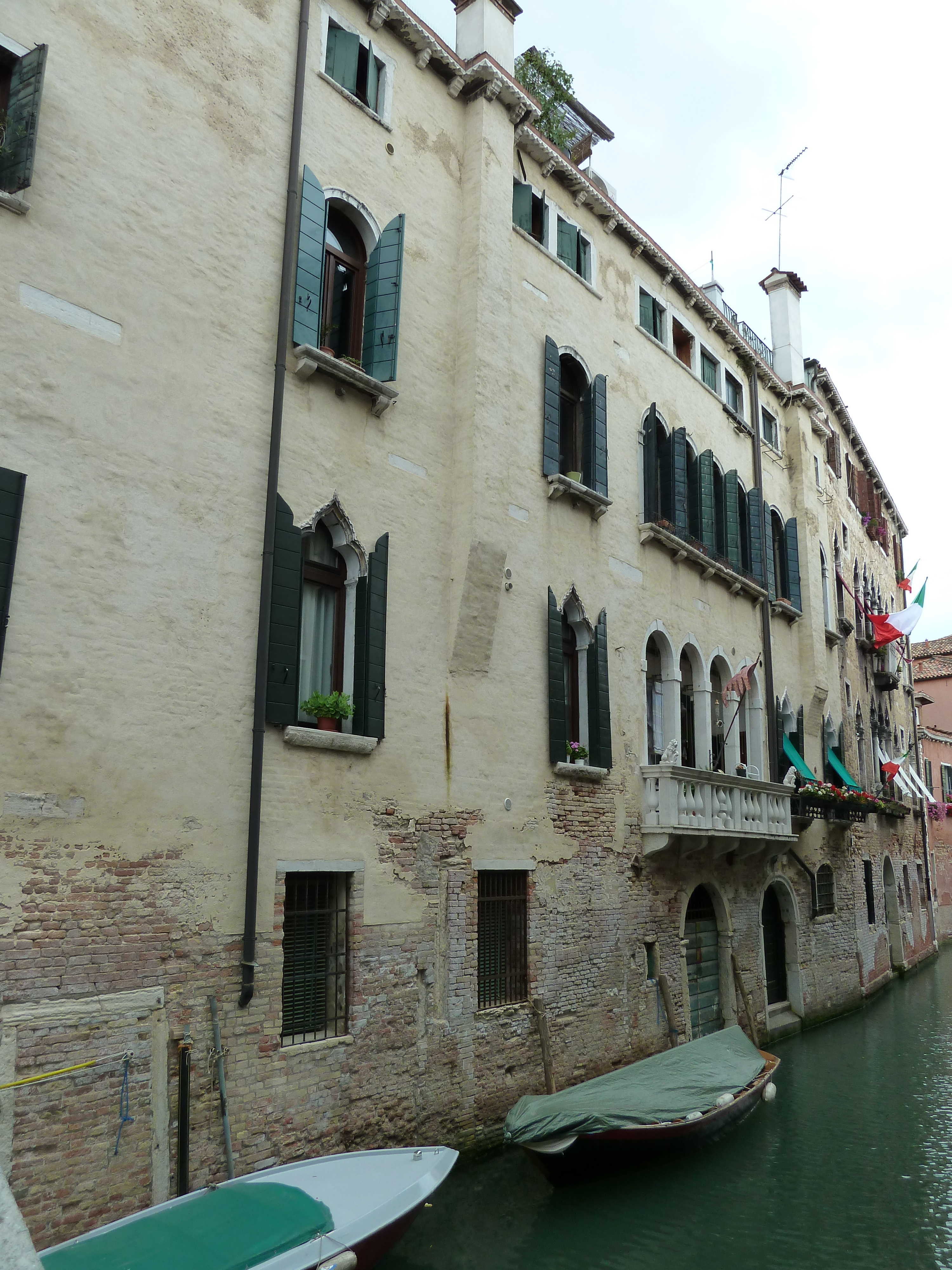 (very probably) Palazzetto Conti Querini (Venice) le long du rio san martino